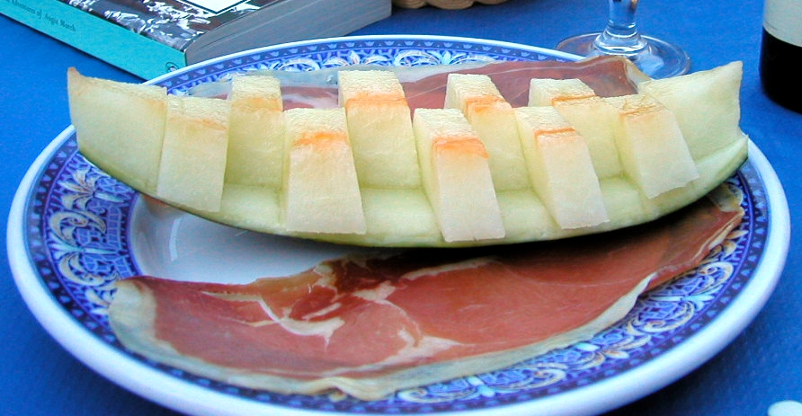 Un plato de melón con jamón, presentado con el melón cortado en trozos, en un bar de Toledo.